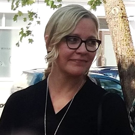 Kuva on rajattu toisesta kuvasta.